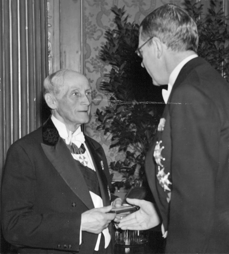 Vid ingenjörsvetenskapsakademien högtidssammanträde på måndagen tilldelade akademien dr. Hugo Hammar sin guldmedalj för hans tekniskt vetenskapliga förtjänster i samband med hans industriella livsverk till höjande av svenskt skeppsbyggeri och svensk sjöfart. Fil.lic Bertil Stålhane erhöll akademins guldmedalj för sina arbeten på överspänningsskyddets område och professor Gustaf Bring Brinellmedaljen i guld för sina banbrytande insatser på anrikningsteknikens område. Bilden visar doktor Hammar mottagande sin belöning ur kronprinsens hand.